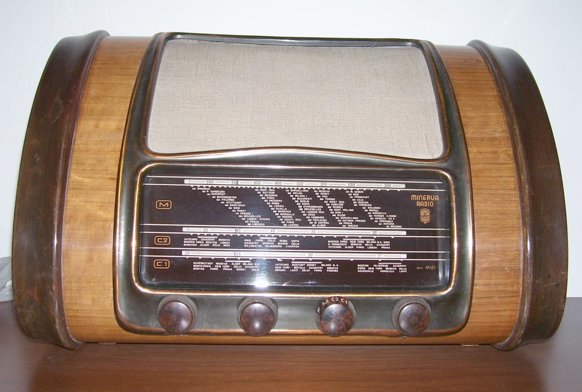 Radio receiver Minerva - Modello 485/2 (Paradiso) - (1947/1948)